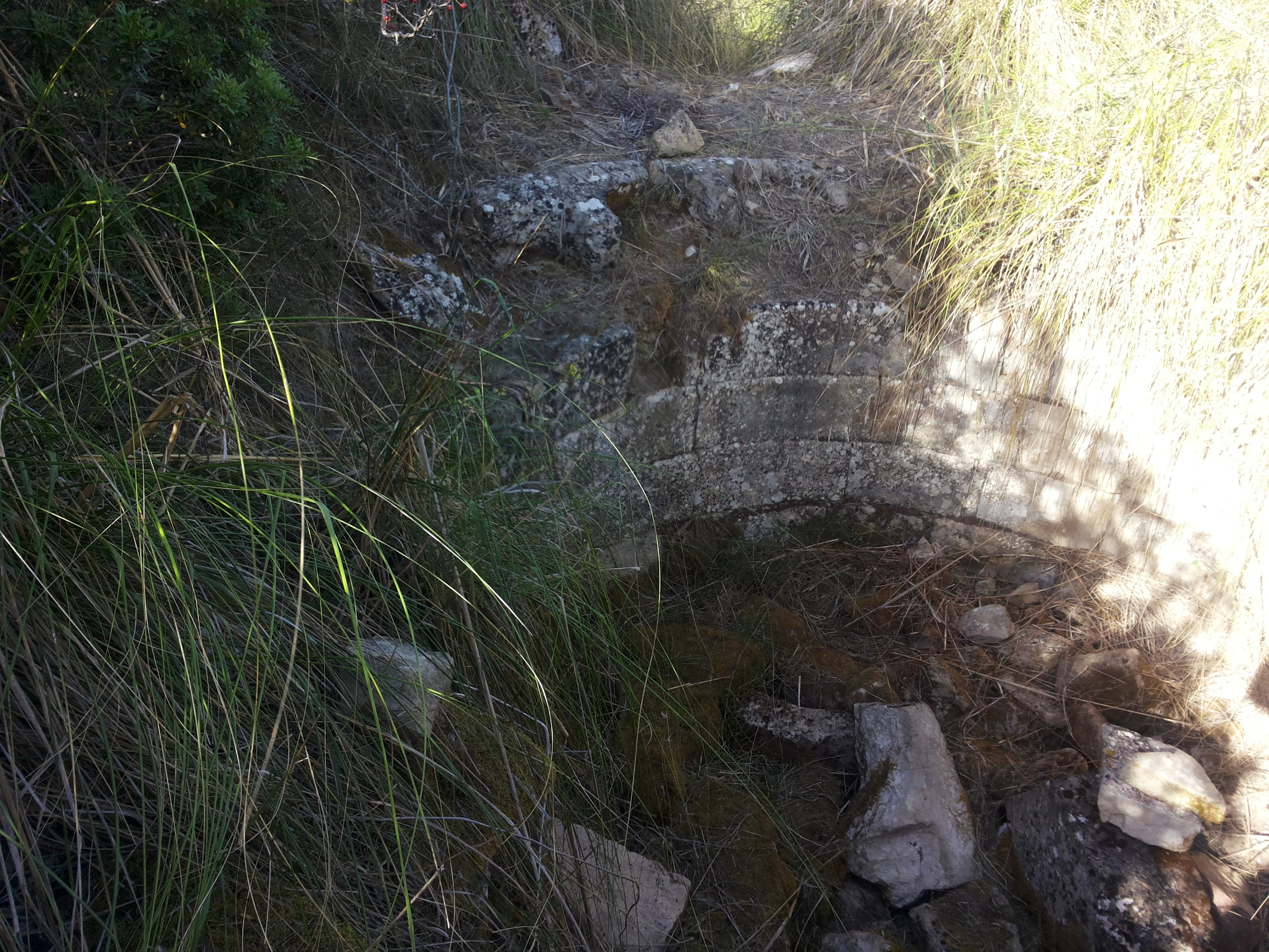 filari isodomi paramento interno